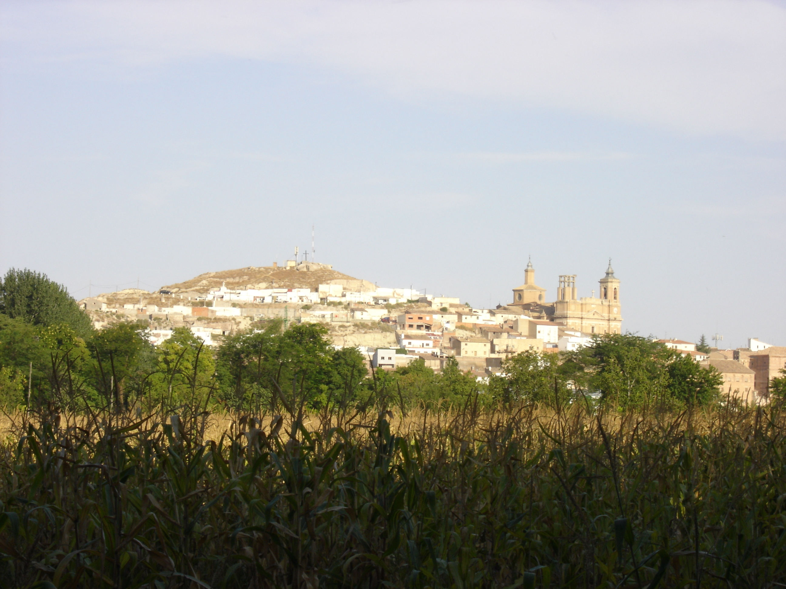 Foto del pueblo de Epila, Zaragoza